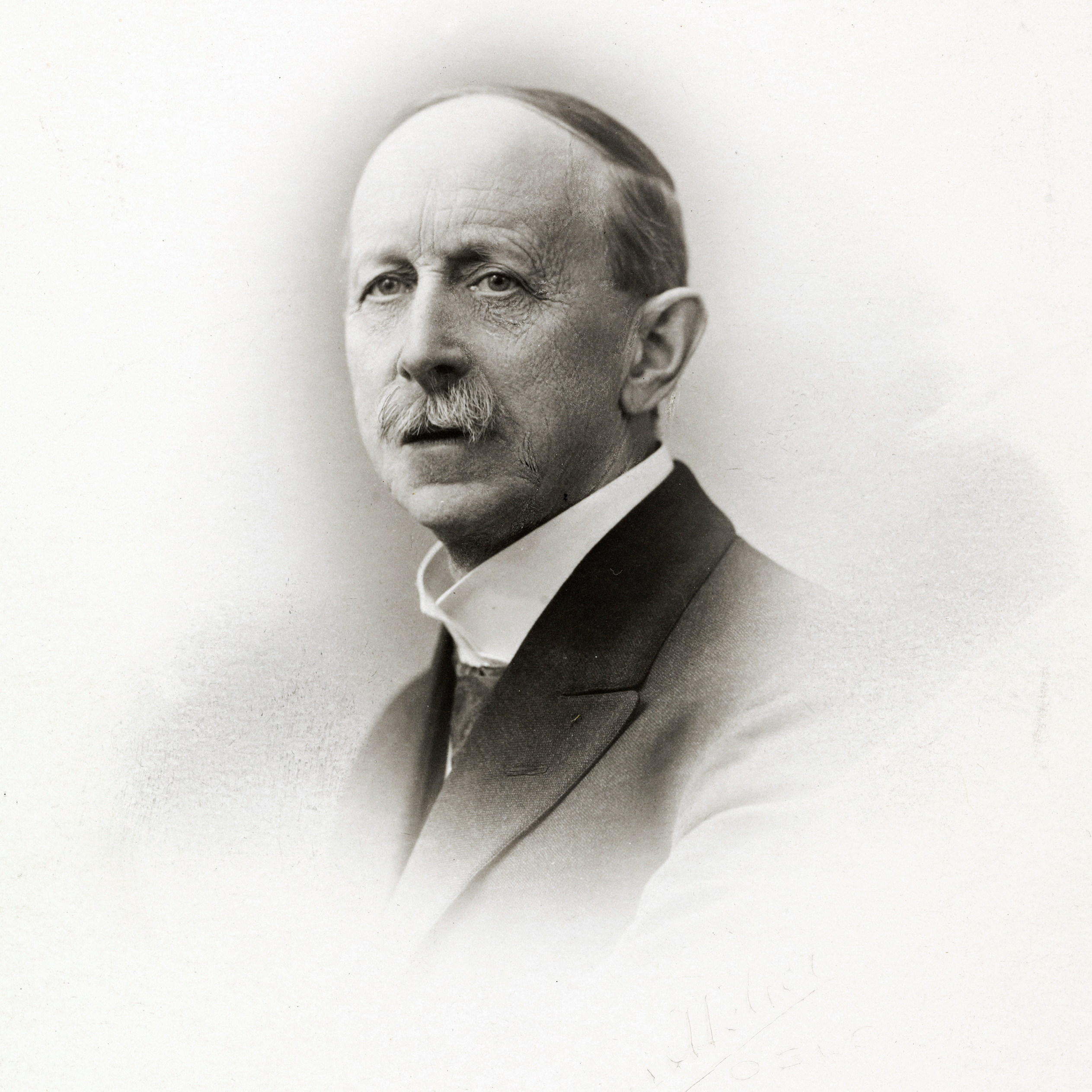 Beskrivelse / Description: Hjalmar Pettersen av bibliograf og bibliotekar. Fra 1898-1926 var han førstebibliotekar og leder av Norske avdeling ved Universitetsbiblioteket i Oslo. Dato / Date: ukjent / unknown Sted / Place: Oslo Fotograf / Photographer: Borgens atelier (Oslo) Digital kopi av original / Digital copy of original: s/h papirpositiv Eier / Owner Institution: Nasjonalbiblioteket / National Library of Norway Lenke / Link: Bildesignatur / Image Number: blds_06049